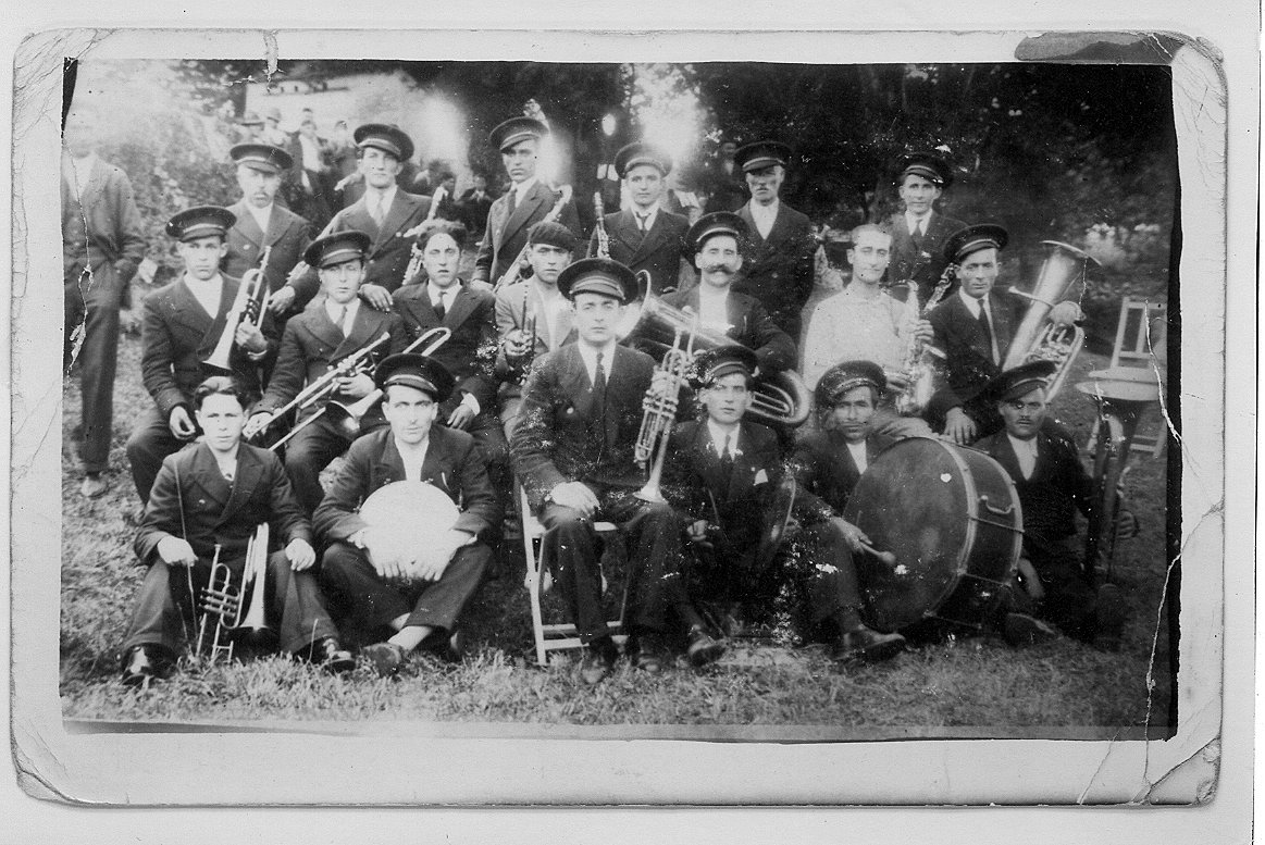 Banda de Musica de Sarria. Sarria, Galicia, Spain